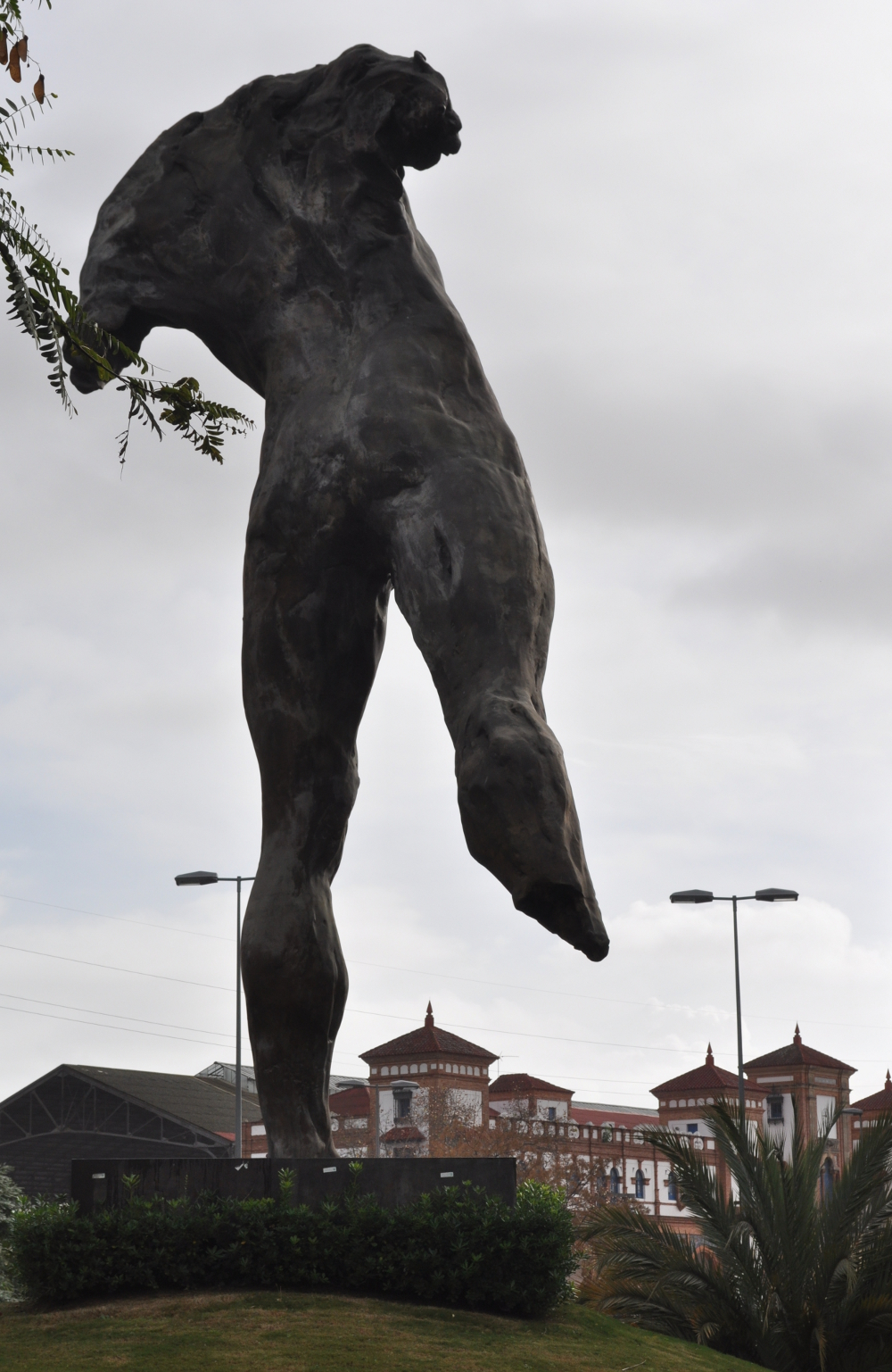 Rotonda del Minotauro